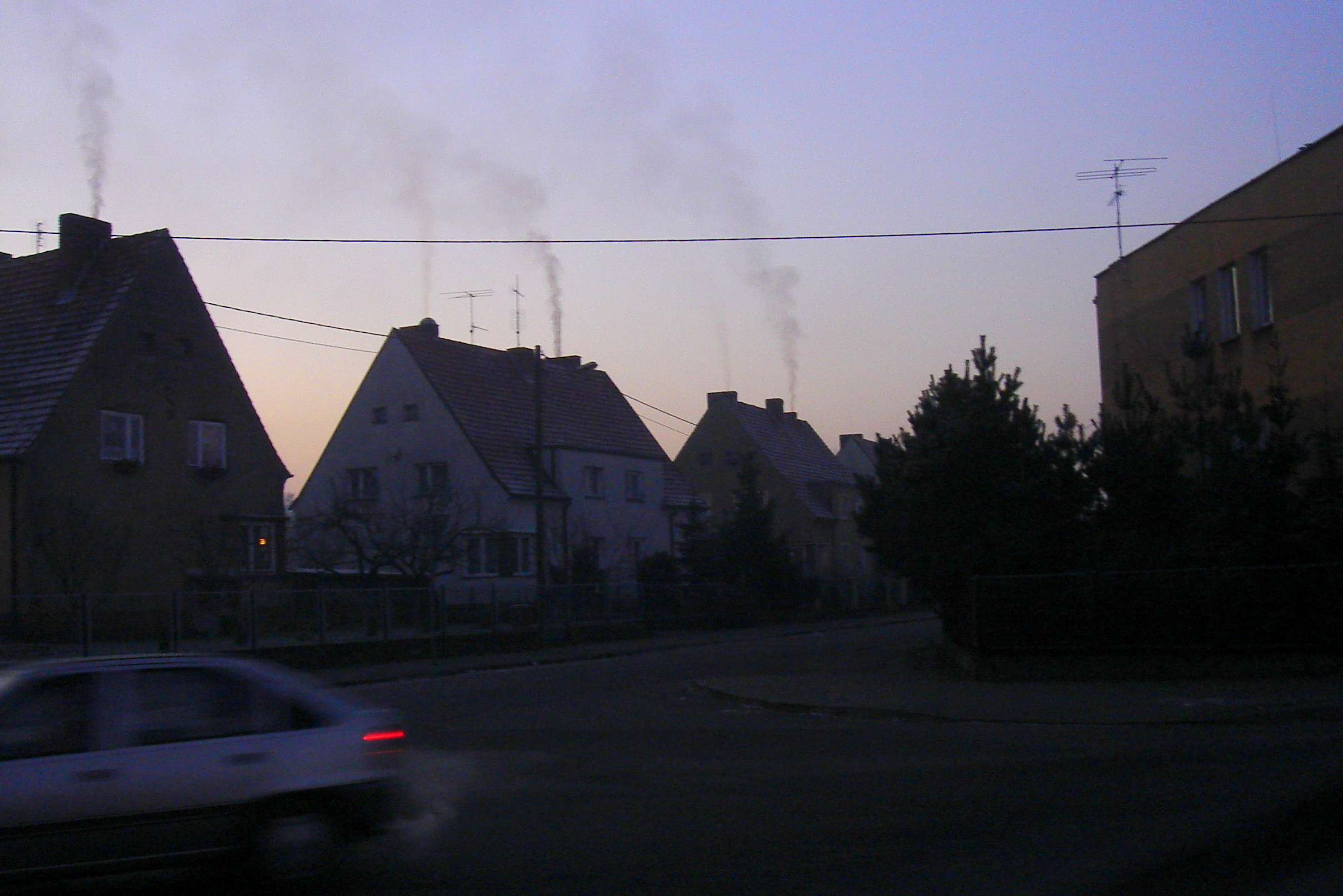 Spalanie paliw stałych w w domowych piecach